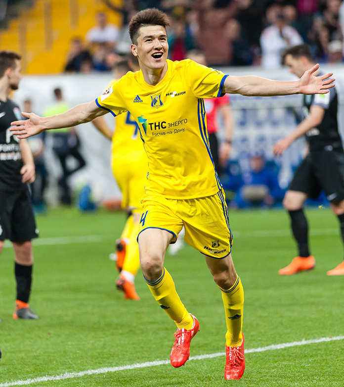 «Ростов» и «Тосно» сыграли на новом красавце-стадионе